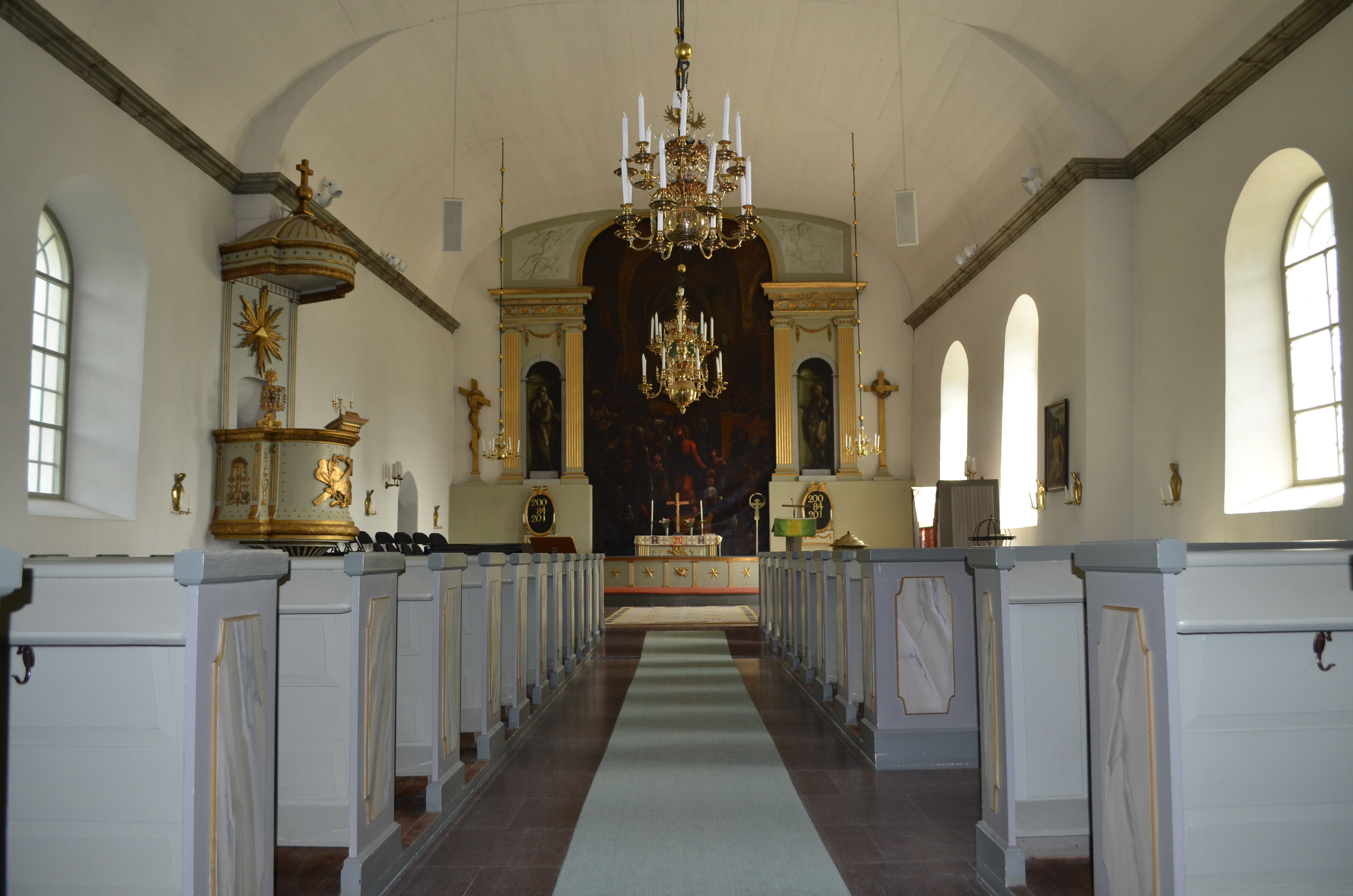 Kykosalen